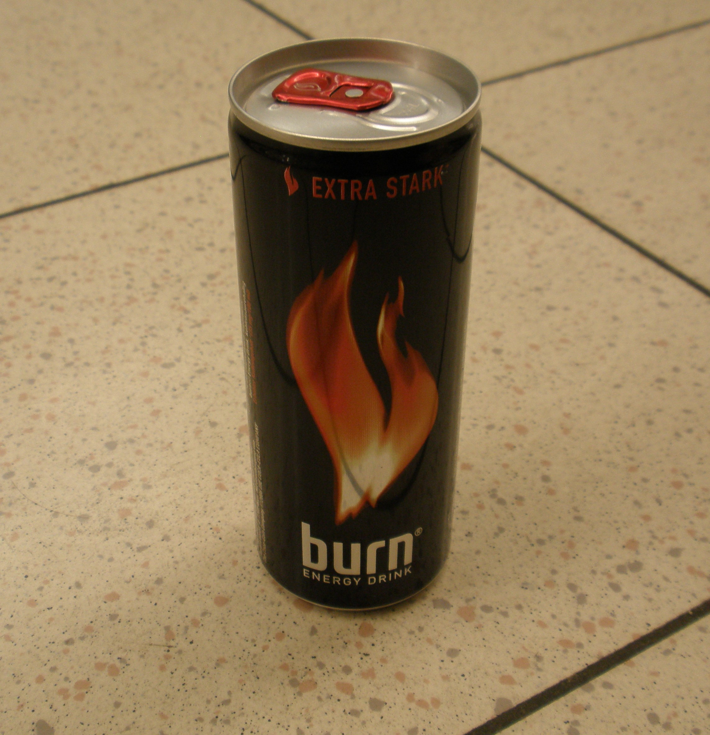 burn Energy Drink (250ml)